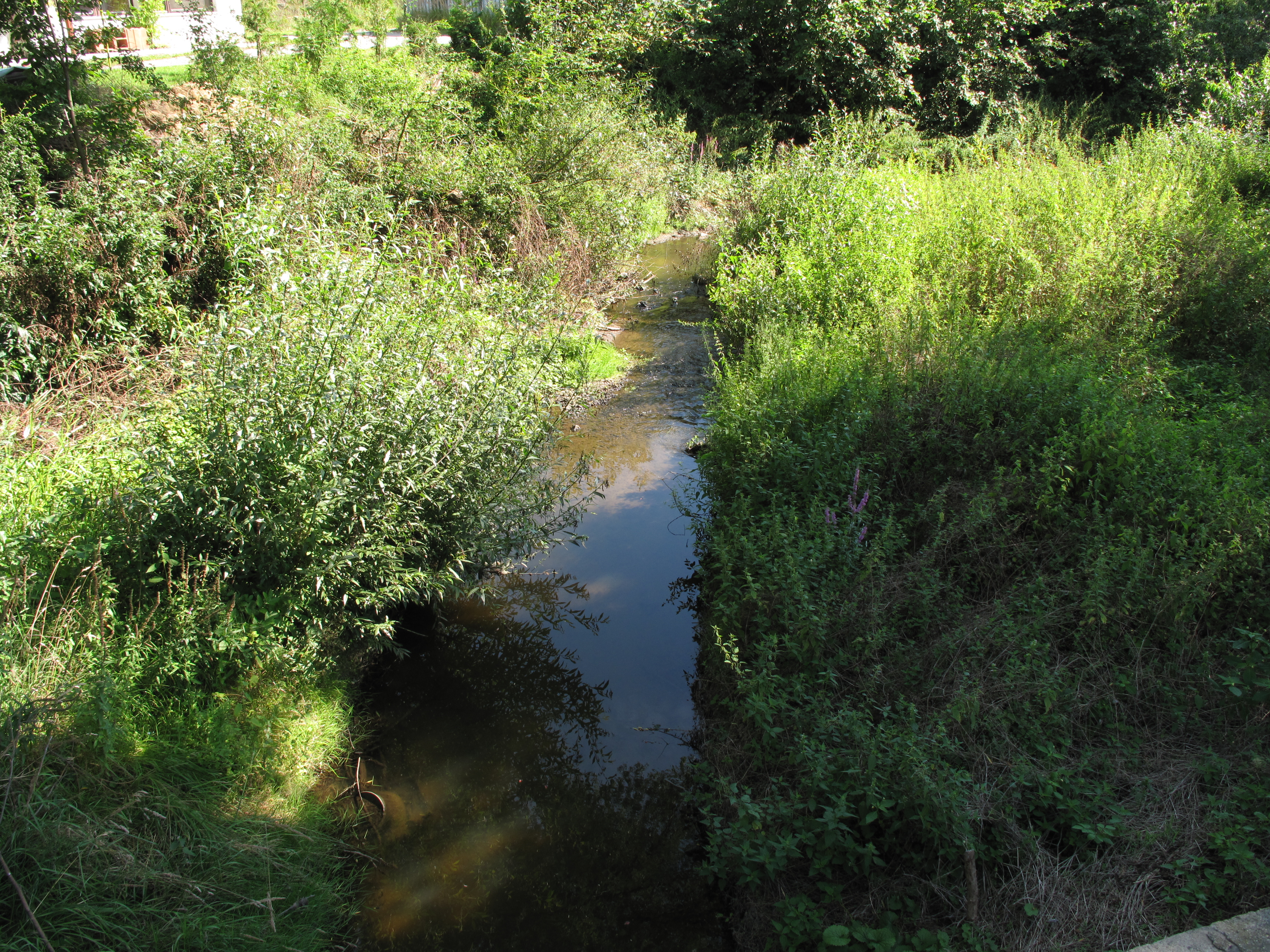 Jiher v Písku. Písek, Česká republika.